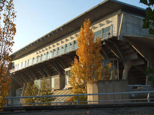 Palacio de los Deportes